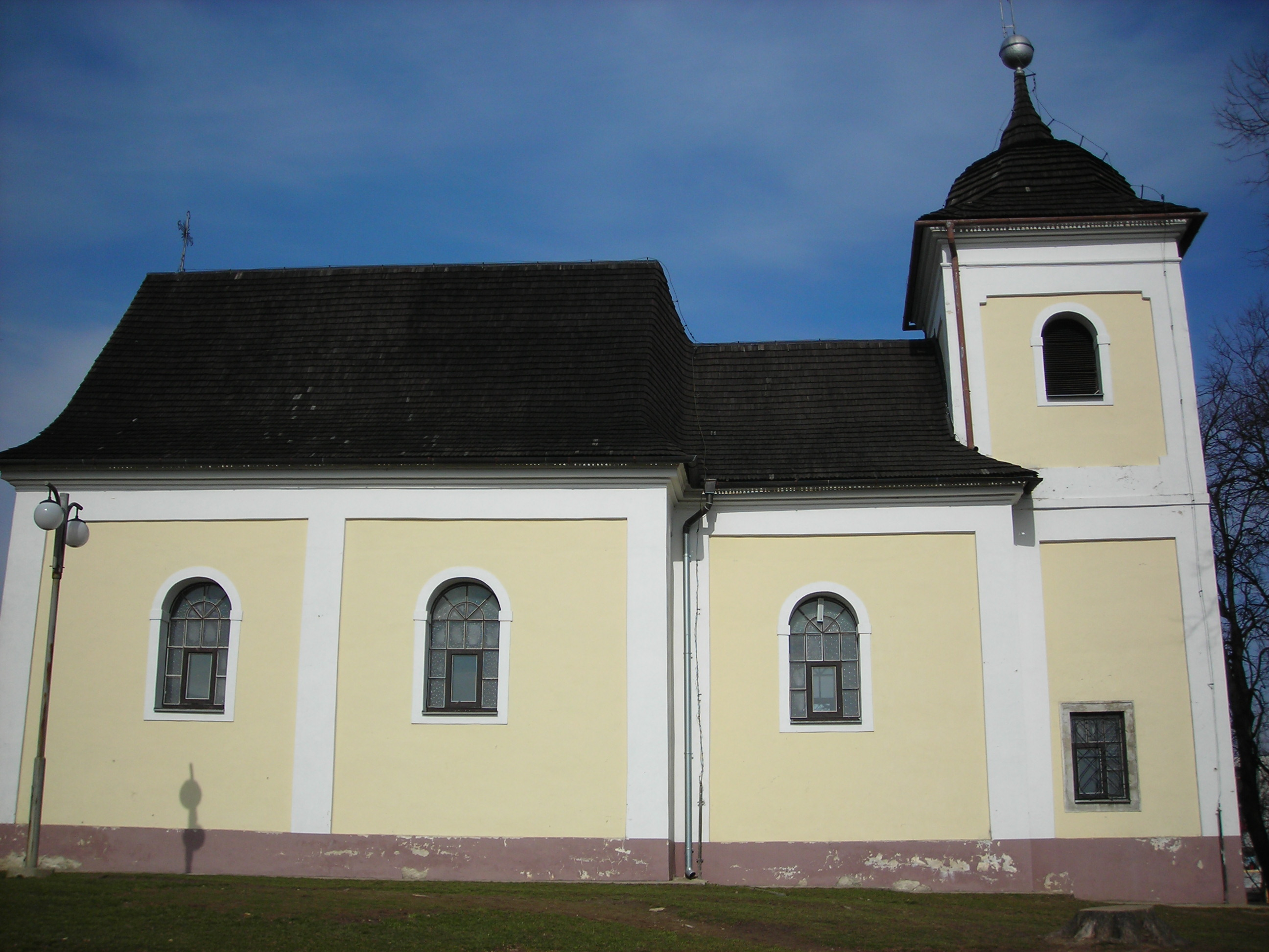 Fotka Kaplnky sv. Heleny v Považskej Bystrici